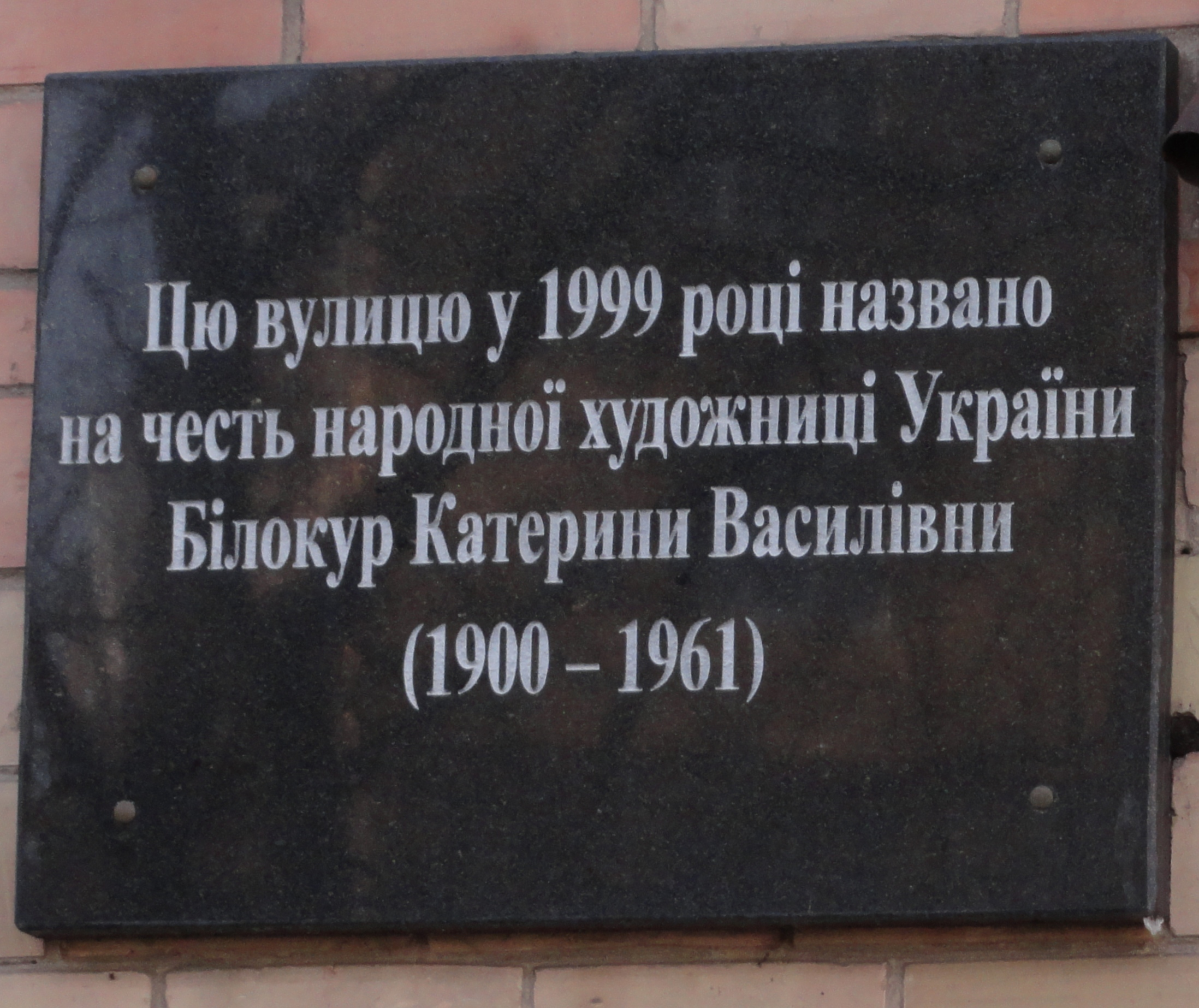 Памятная доска в Киеве на улице названной в честь Екатерины Белокур.